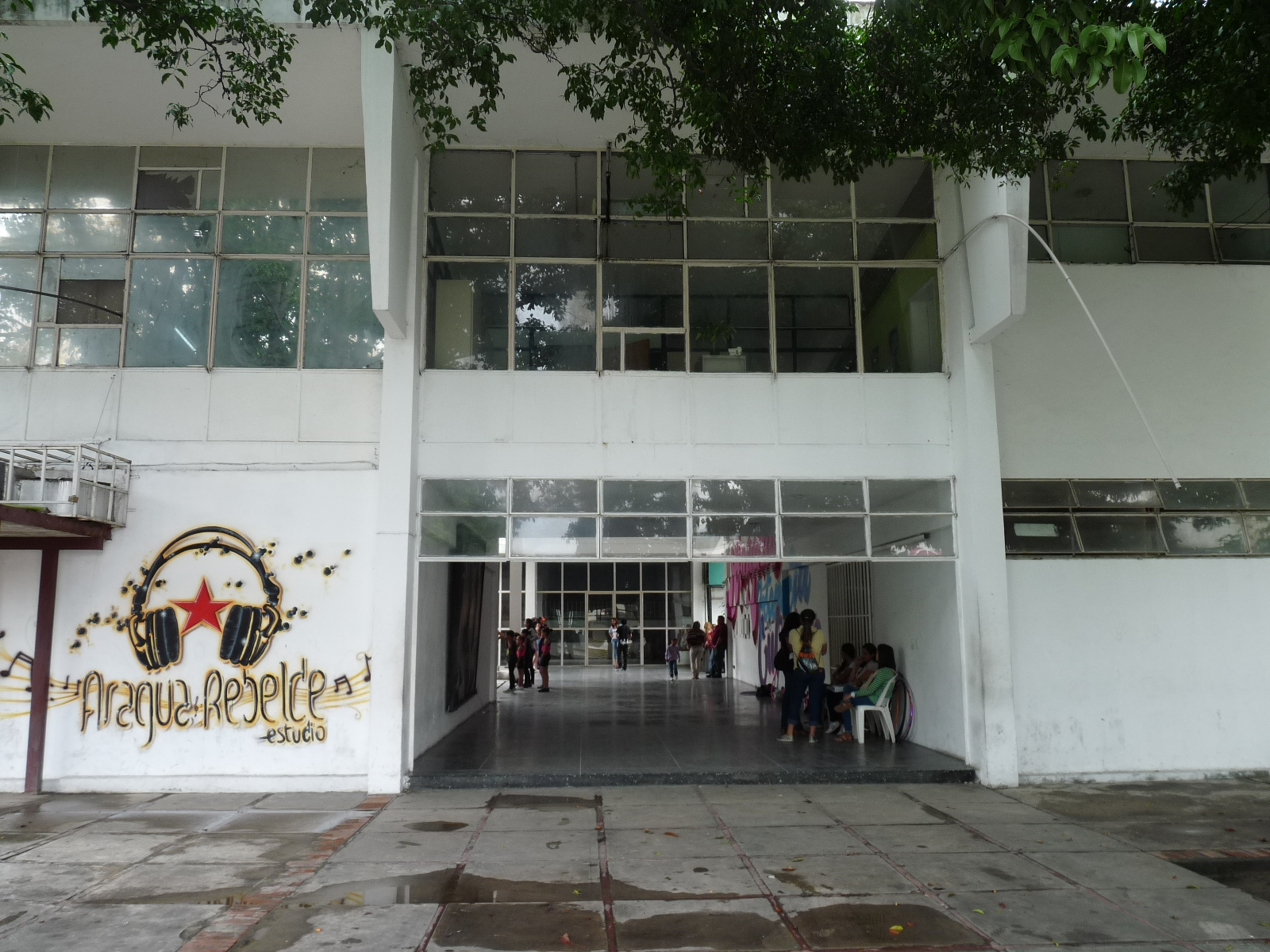 Sede de la Casa de la Cultura de Maracay